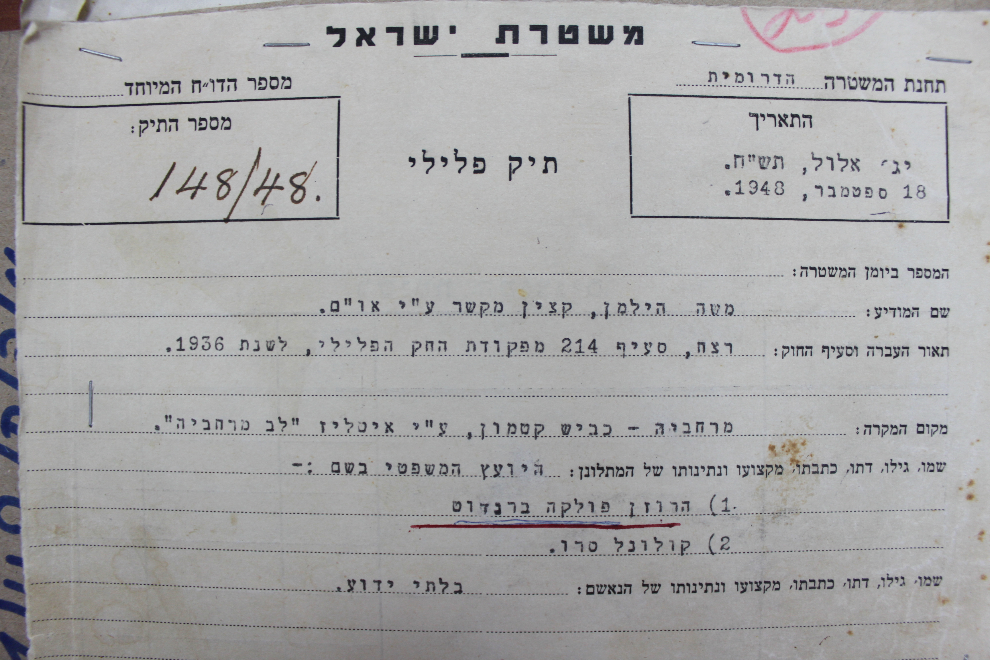 כותרת תיק חקירה 148/48של משטרת ירושלים, העוסק בהתנקשות בברנדוט ובסארו. מתיקי משטרת ישראל, ארכיון המדינה.